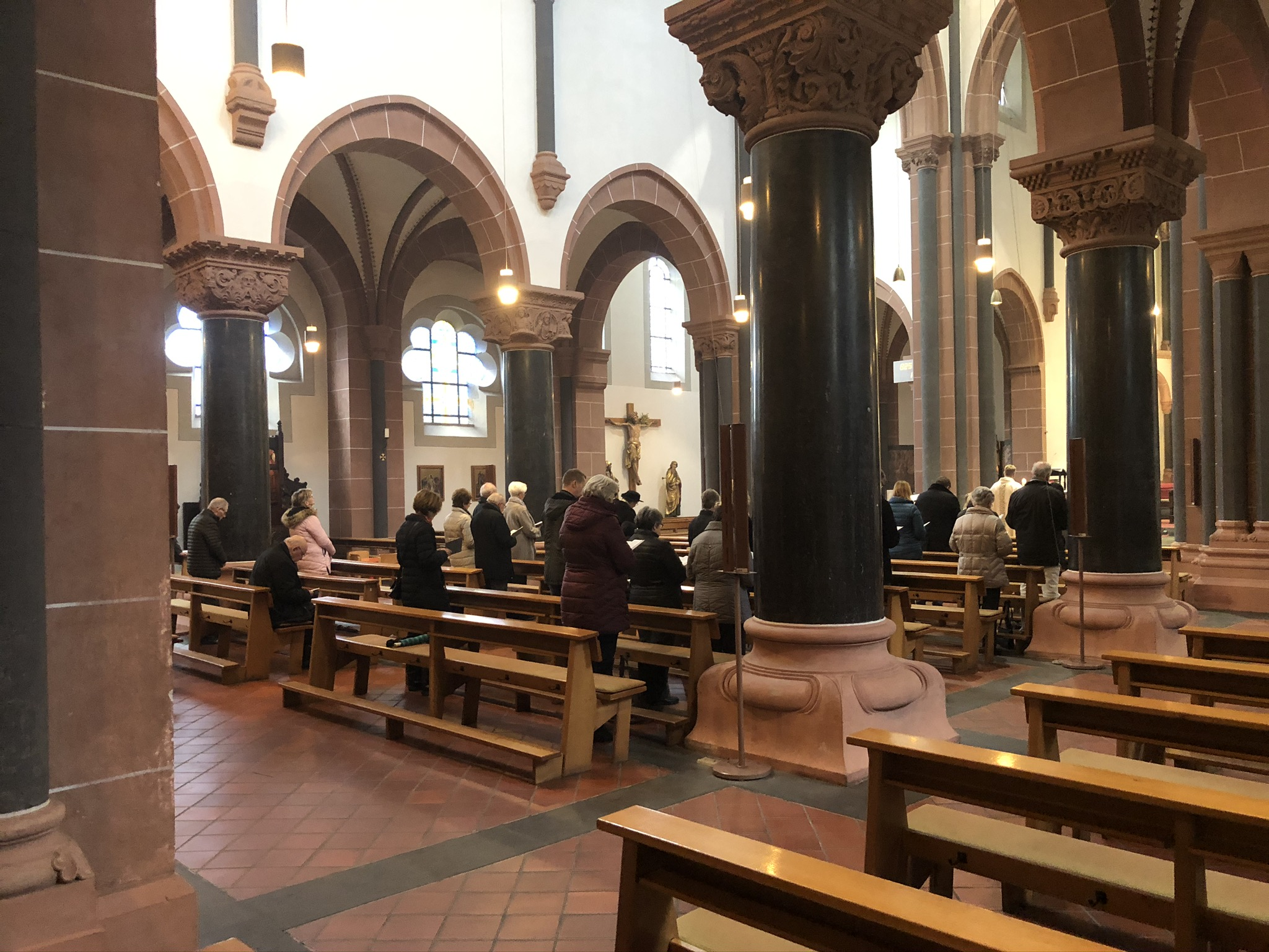 Hauptschiff des neuromanischen Teils der St. Peter und Paul Kirche in Remagen, Deutschland